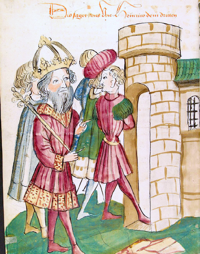 Bildtitel: Kaiser Heinrich II. läßt Fürst Pandulf IV. von Capua gefangensetzen Werkstatt: Werkstatt des Diebold Lauber Künstler: Anonymus Buchschmuck: Zeichnung (ganzseitig),ungerahmt Technik: Feder & koloriert Farben: Wasserfarbe & Deckfarbe Handschrift: Cod. Pal. Germ. 149, UB Heidelberg